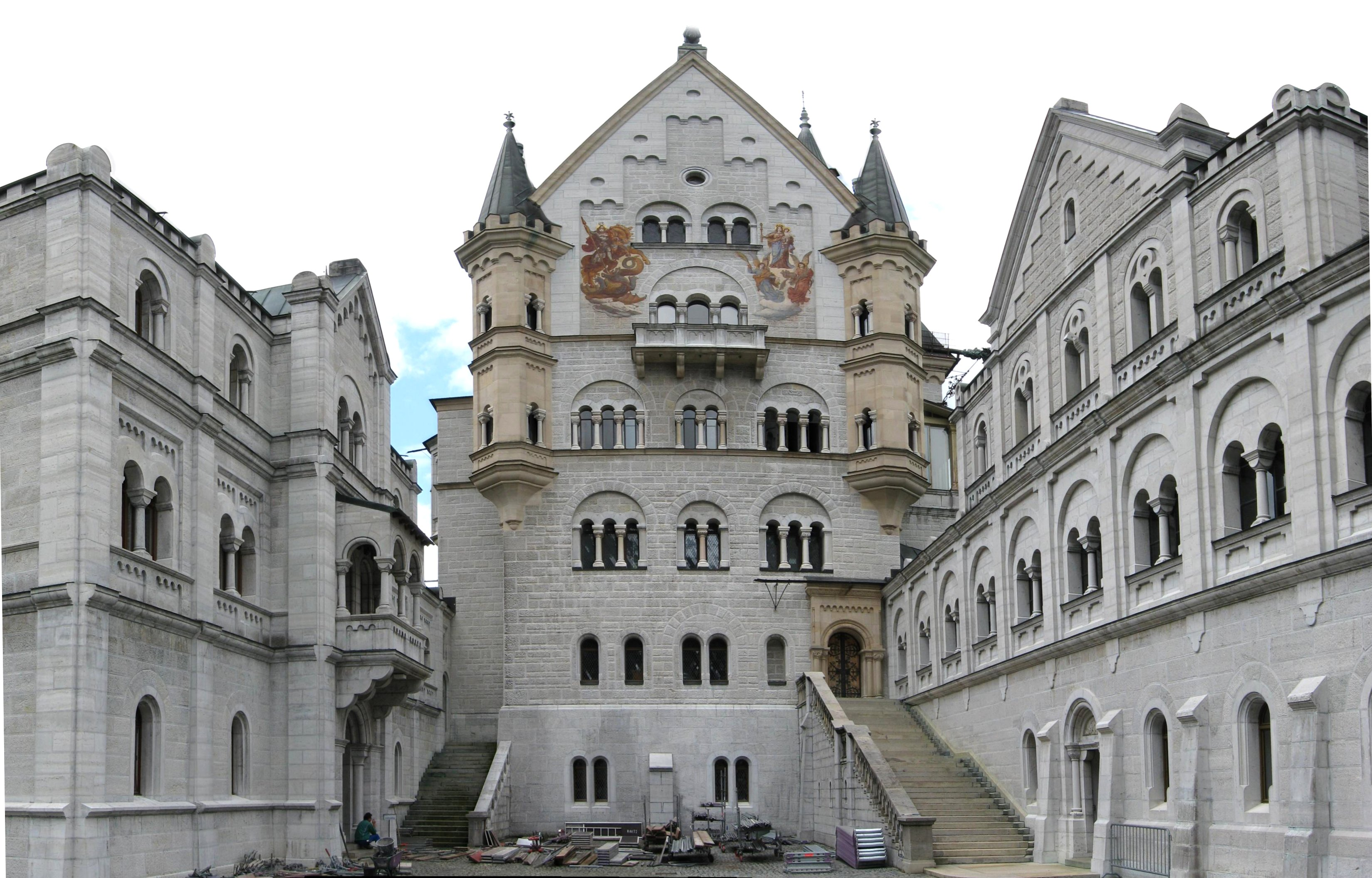 Neuschwanstein